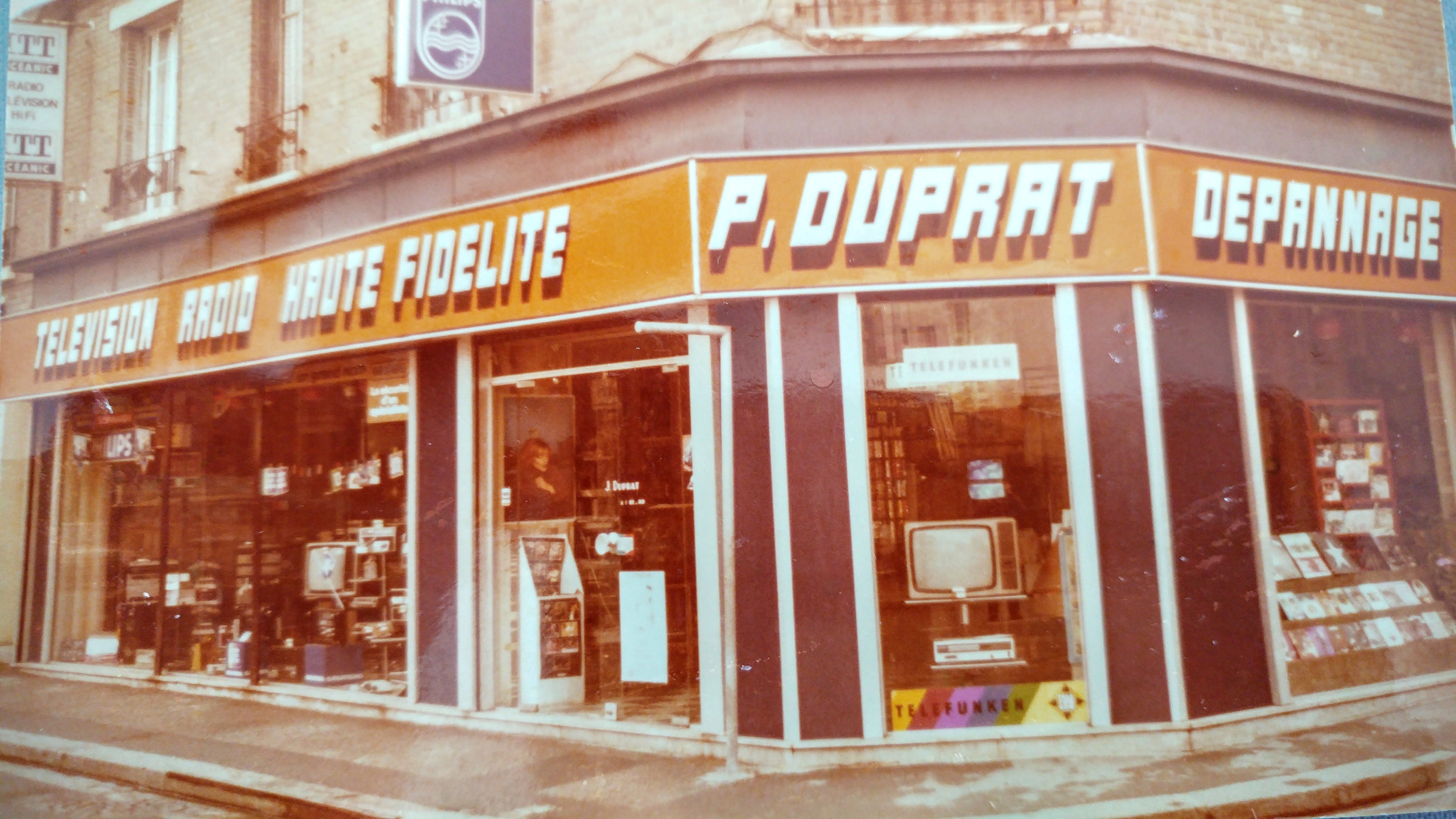 Magasin Duprat, 25 avenue Marceau